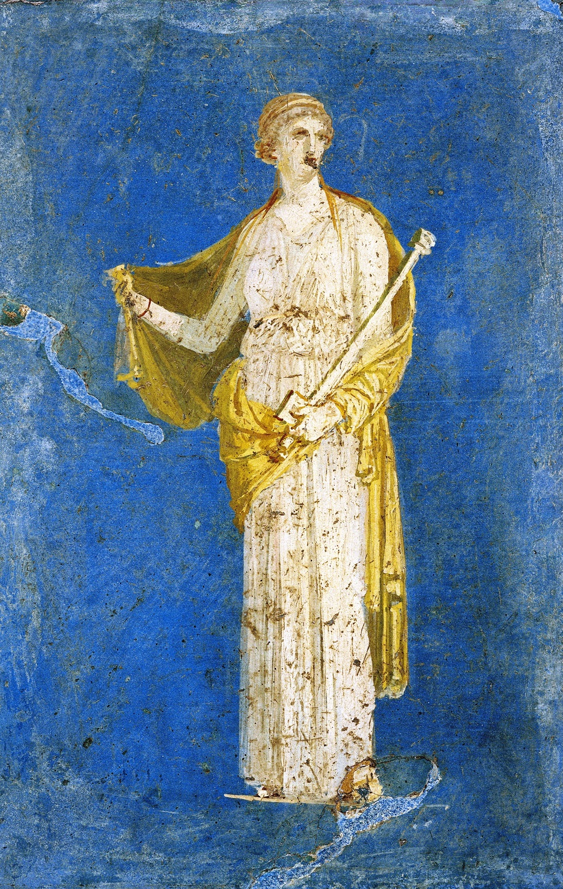 Affresco (cm 38 x 26) raffigurante Medea, proveniente da Villa Arianna a Stabia (cubicolo W 26) e conservato al Museo Archeologico Nazionale di Napoli (inv. 8978).